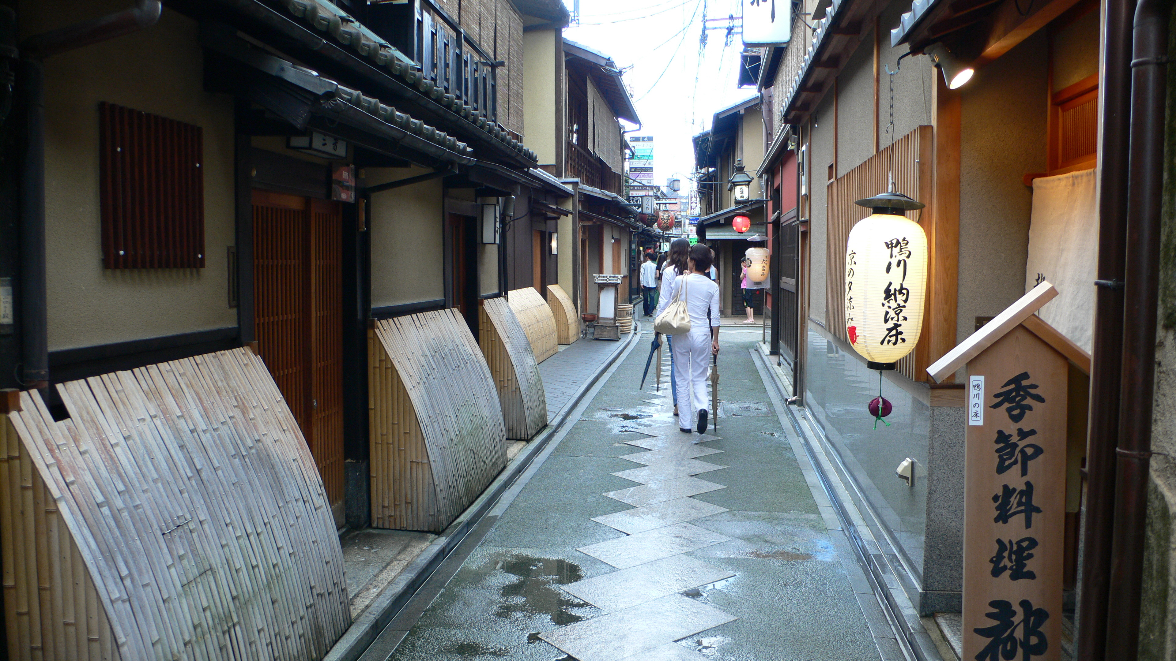 Pontocho